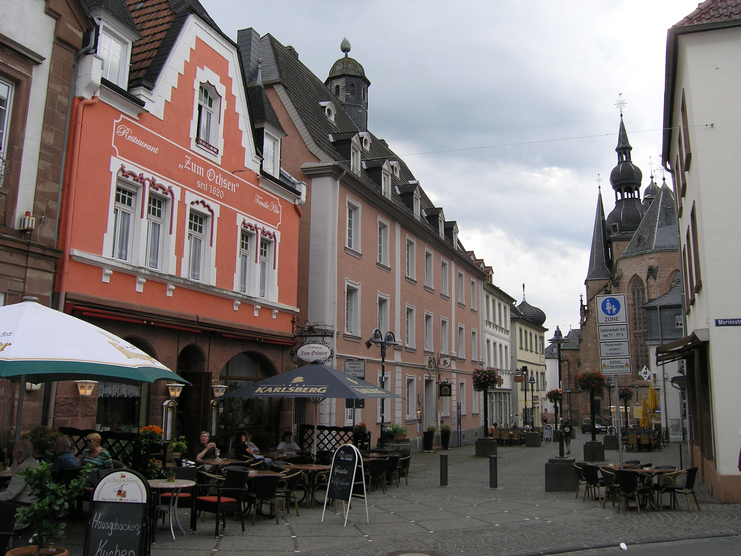 St. Wendel: Magdalenenkapelle (Nordseite)